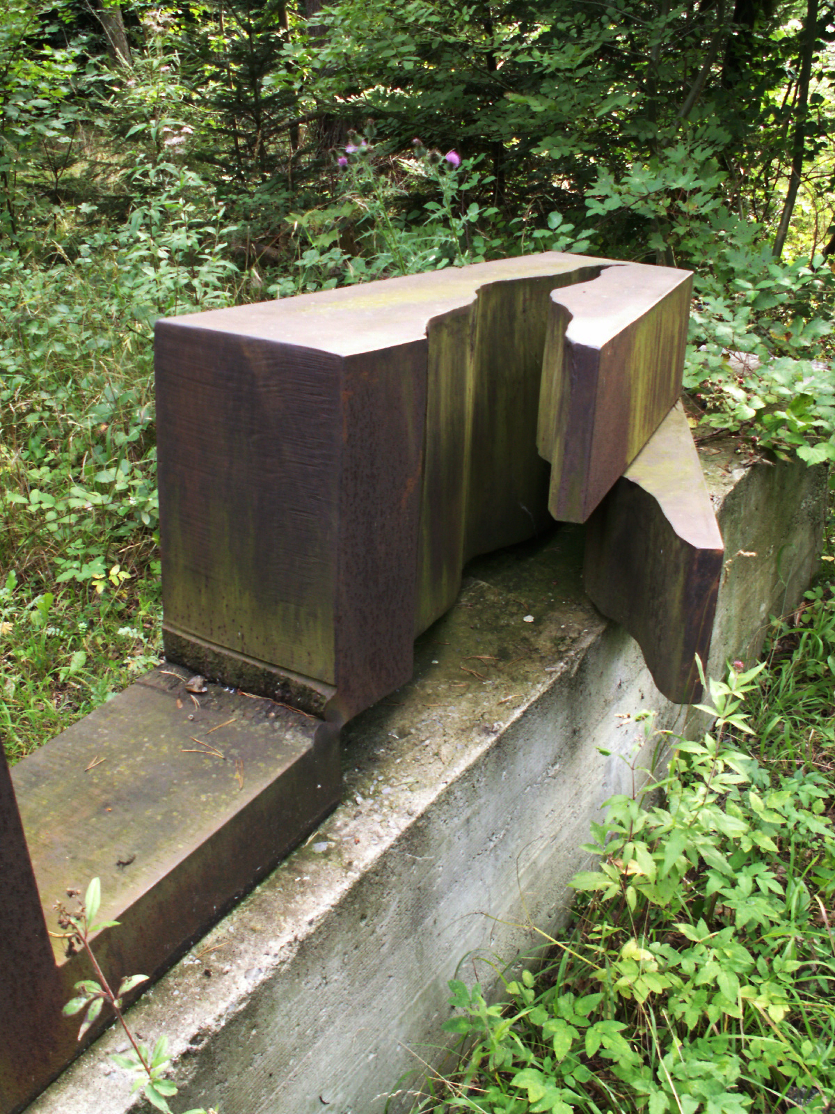 Gert Riel, Landschaft - (Ausschnitt), - Skulpturenweg Seehaus Pforzheim, Deutschland, Baden-Württemberg, Enzkreis